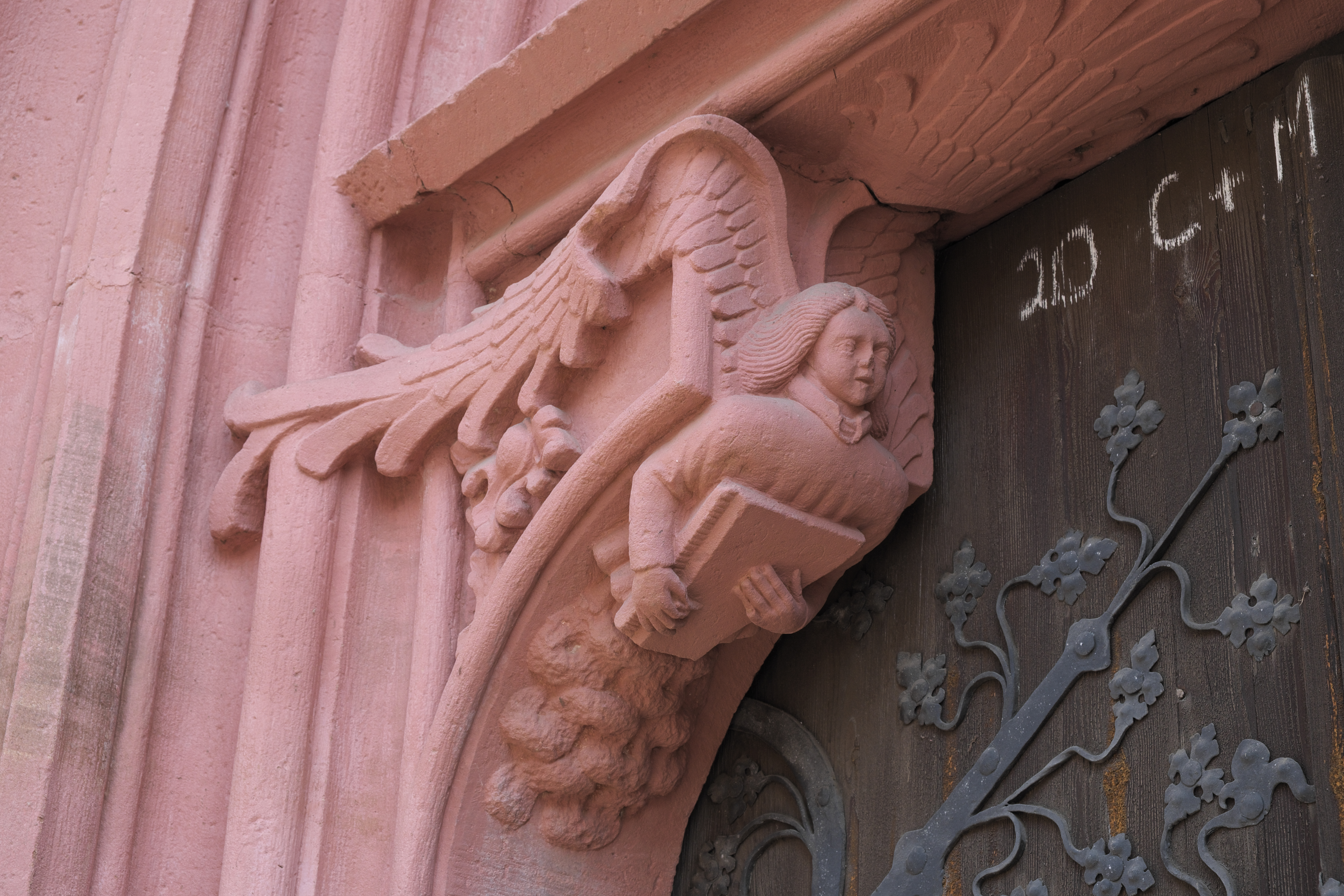 Katholische Martinskapelle in Bürgstadt im Landkreis Miltenberg (Unterfranken/Bayern), gotisches Westportal, um 1490, Konsole am Türstürz mit Engelsfigur